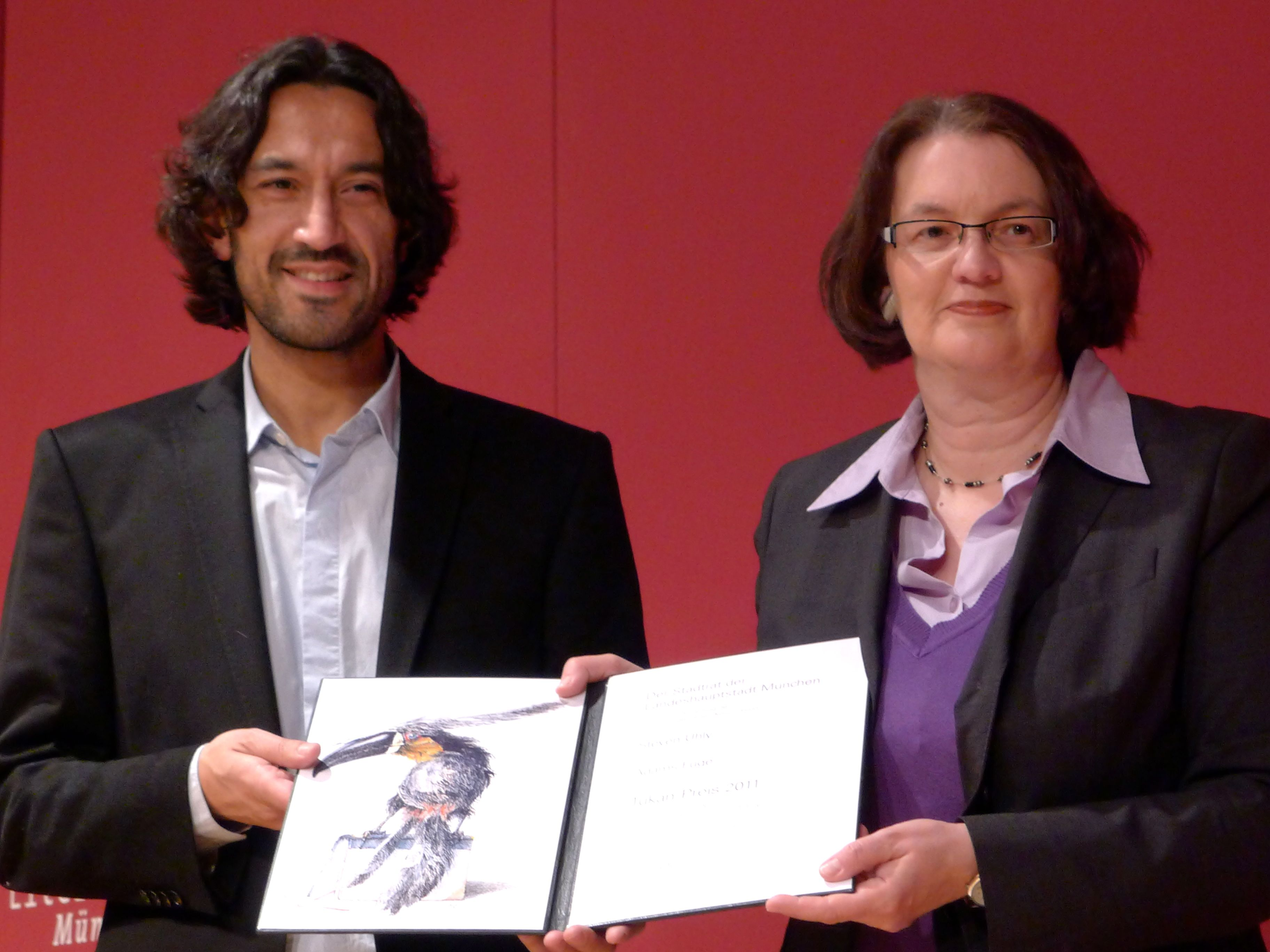 Steven Uhly erhält den TUKAN-Preis 2011 aus den Händen der Münchner Bürgermeisterin Christine Strobl für seinen Roman "Adams Fuge"